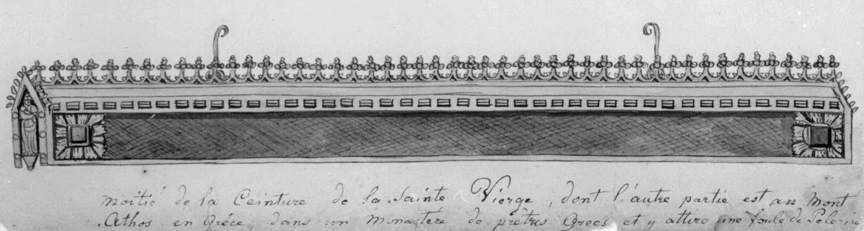 Tekening van Philippe van Gulpen van de zgn. gordel van Maria in de Schatkamer van de Onze-Lieve-Vrouwekerk in Maastricht. Onderschrift: "Moitié de la Ceinture de la Sainte Vierge, dont l'autre partie est au Mont Athos en Grèce, dans un monastère de prêtres Grecs et y attire une foule de Pelerins". Collectie Van der Noordaa in het RHCL, Maastricht, CVDN 339.